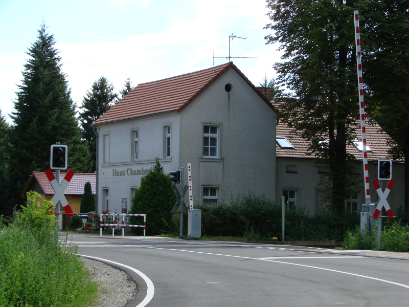 Das Haus wurde nach dem Flieger Chamberlain benannt, der bei Klinge im Jahr 1927 notlandete. Der Ort Klinge gehört zur Gemeinde Wiesengrund im Landkreis Spree-Neiße (Brandenburg).